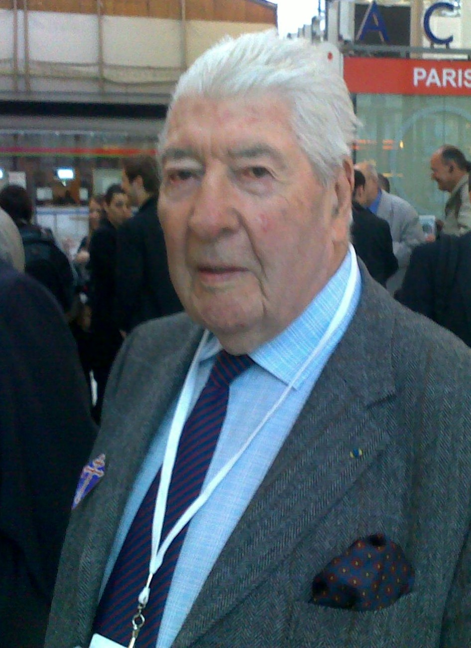 L'amiral François Flohic à l'embarquement du train spécial 70° anniversaire de l'Appel du 18 juin (Gare du Nord, Paris, 18 juin 2010)